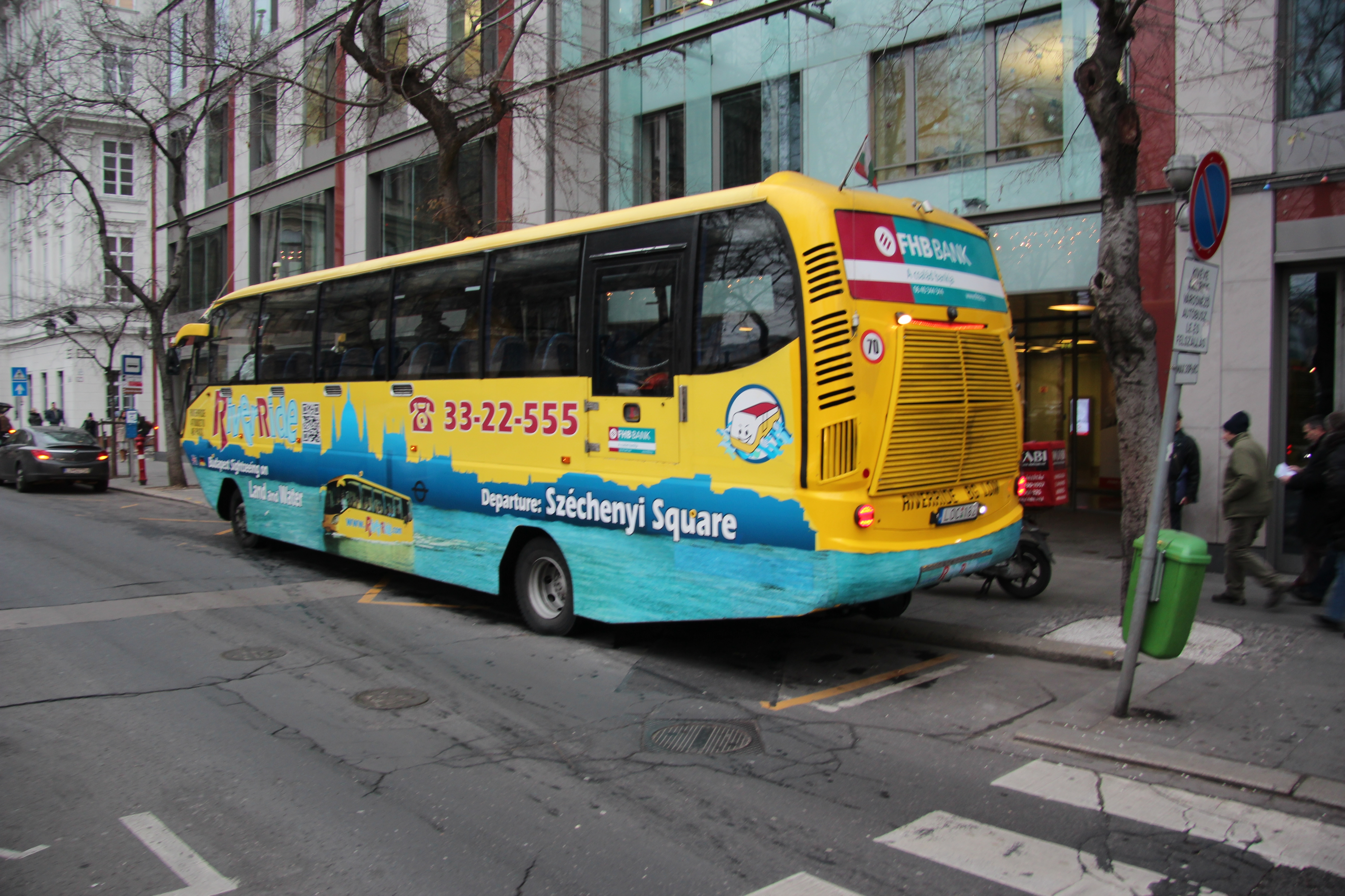 Kombinierter Bus-Boot in Budapest beim Abfahrtsplatz